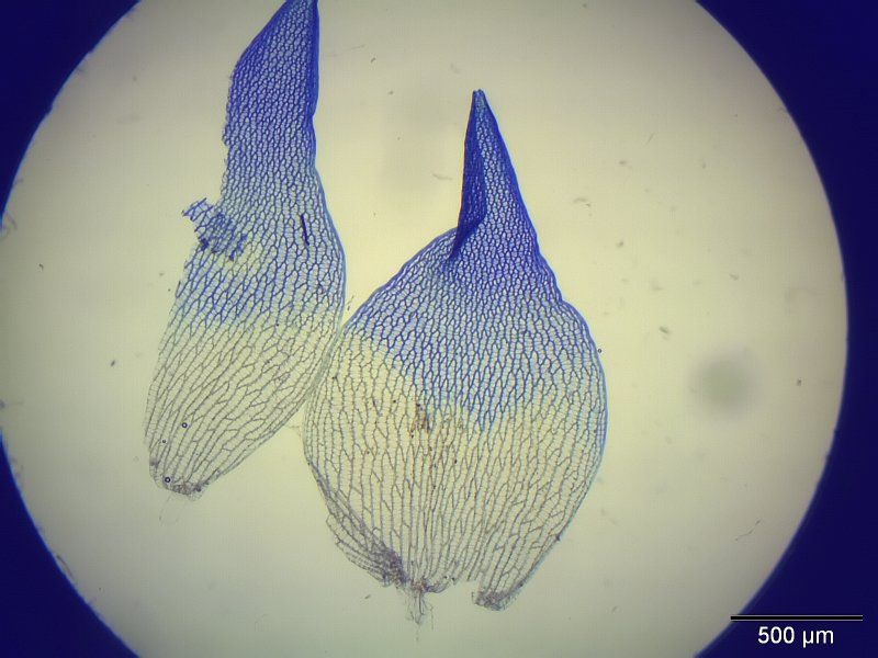 Sphagnum teres, Asblatt, 40x